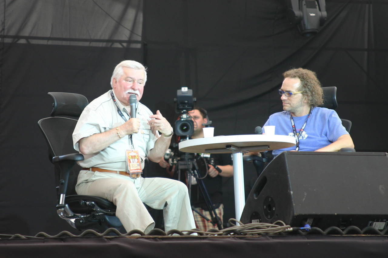 Lech Wałęsa (links) und Piotr Najsztub auf der Haltestelle Woodstock 2009.